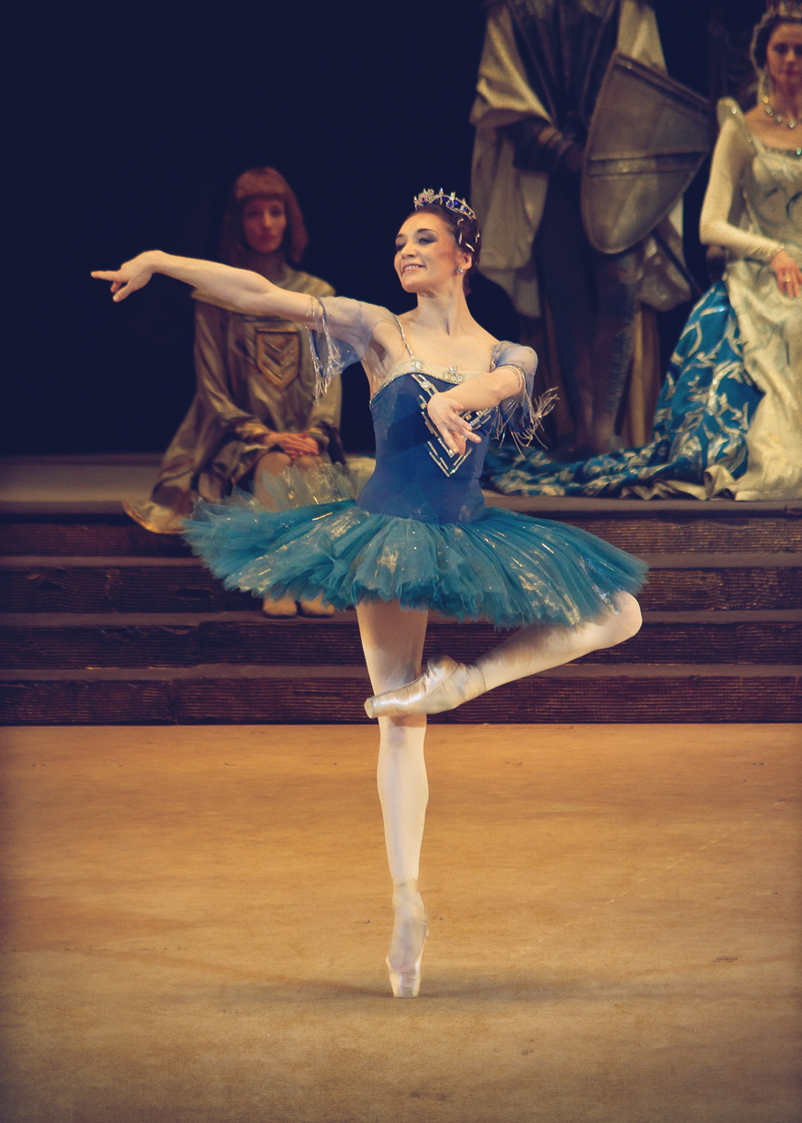 Надежда Грачёвав партии Раймонды, балет "Раймонда", Большой театр, Москва